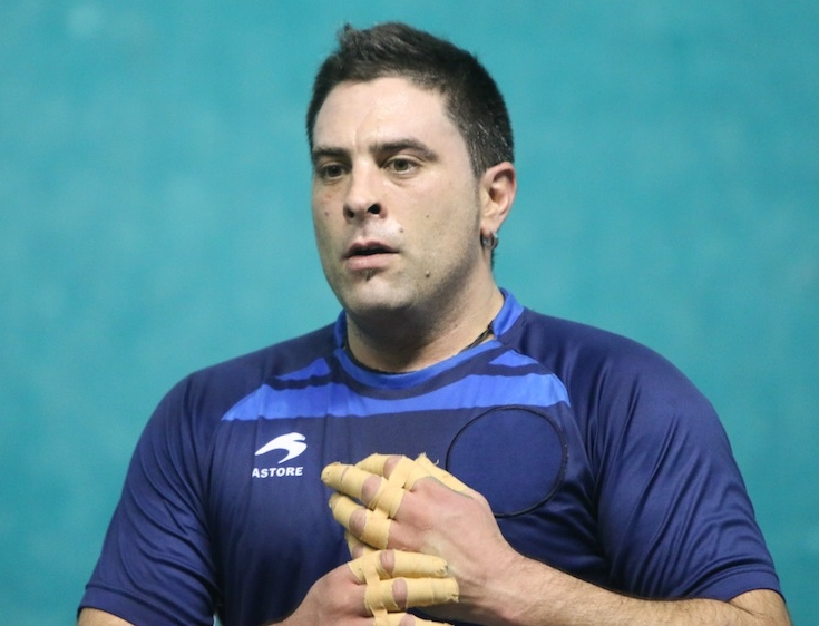 Mikel Goñi esku huskako pilotaria, 2014an